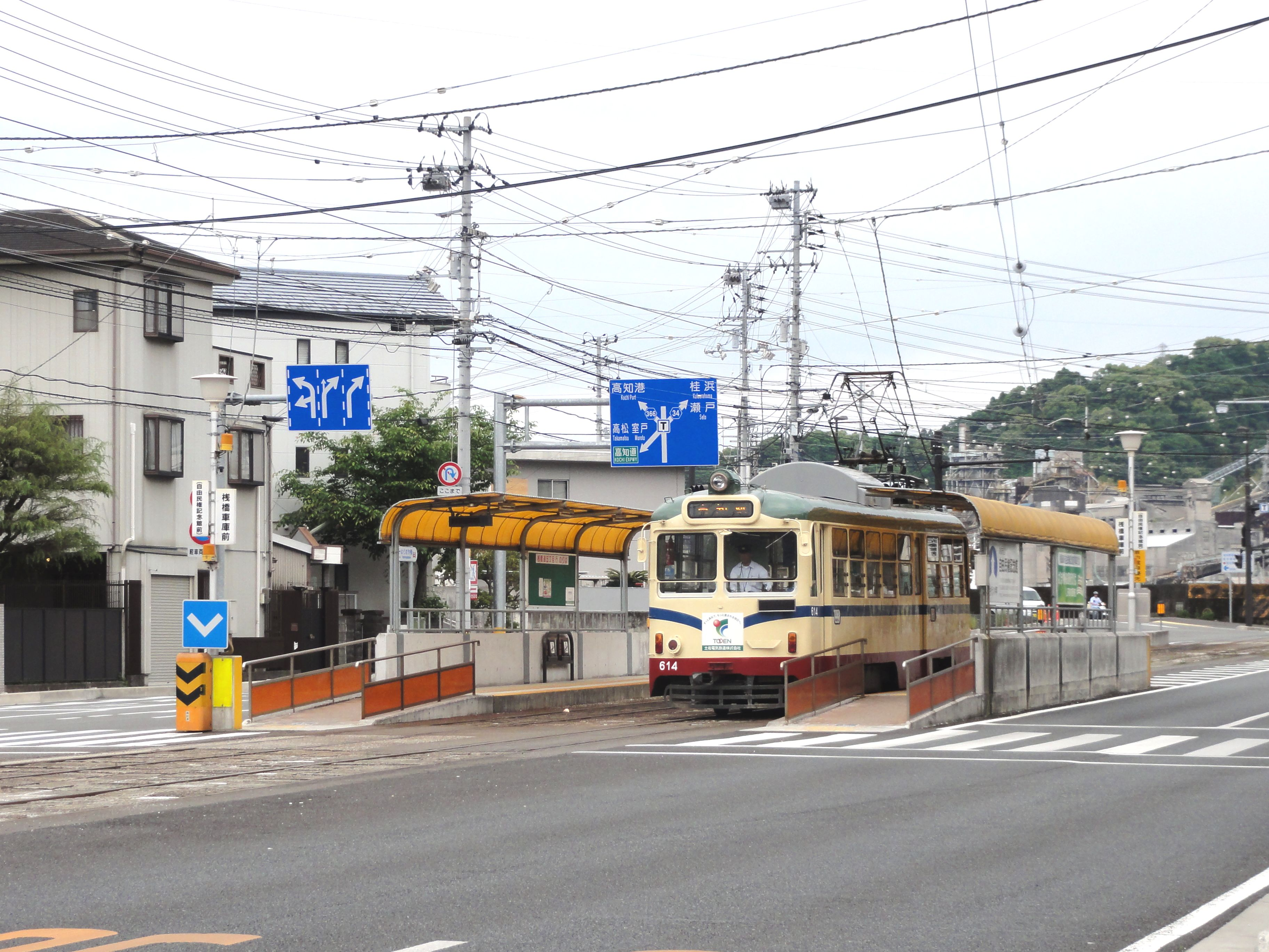 土佐電気鉄道・桟橋車庫前電停